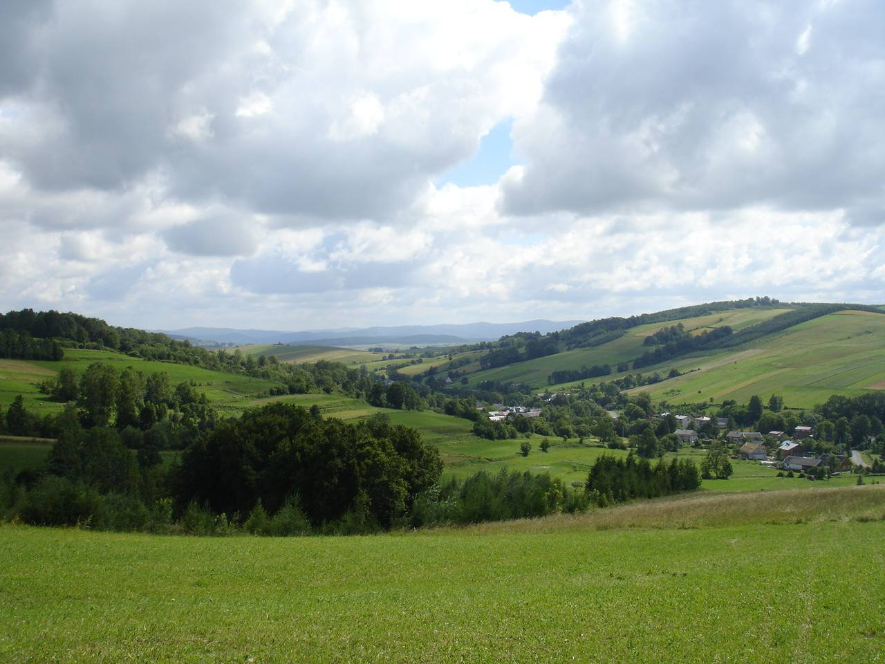 Pogórze Bukowskie, Nadolany